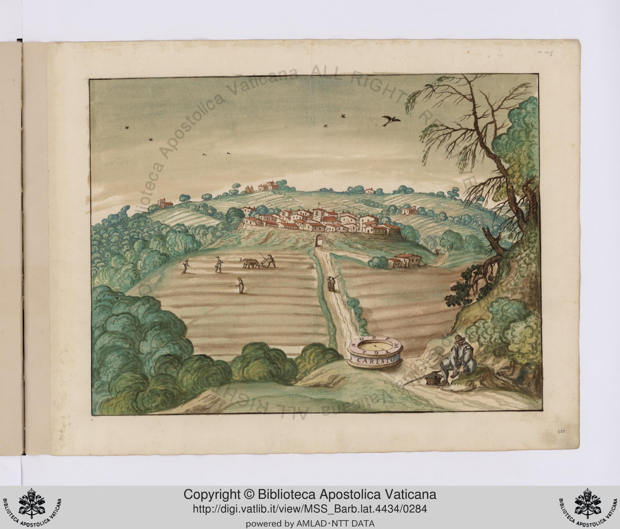 il borgo di caresto nelle tavole del codice barbeinese